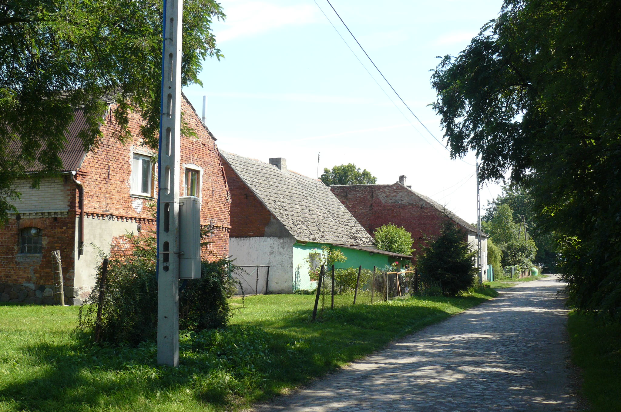 Komorówko w gm. St. Czarnowo.